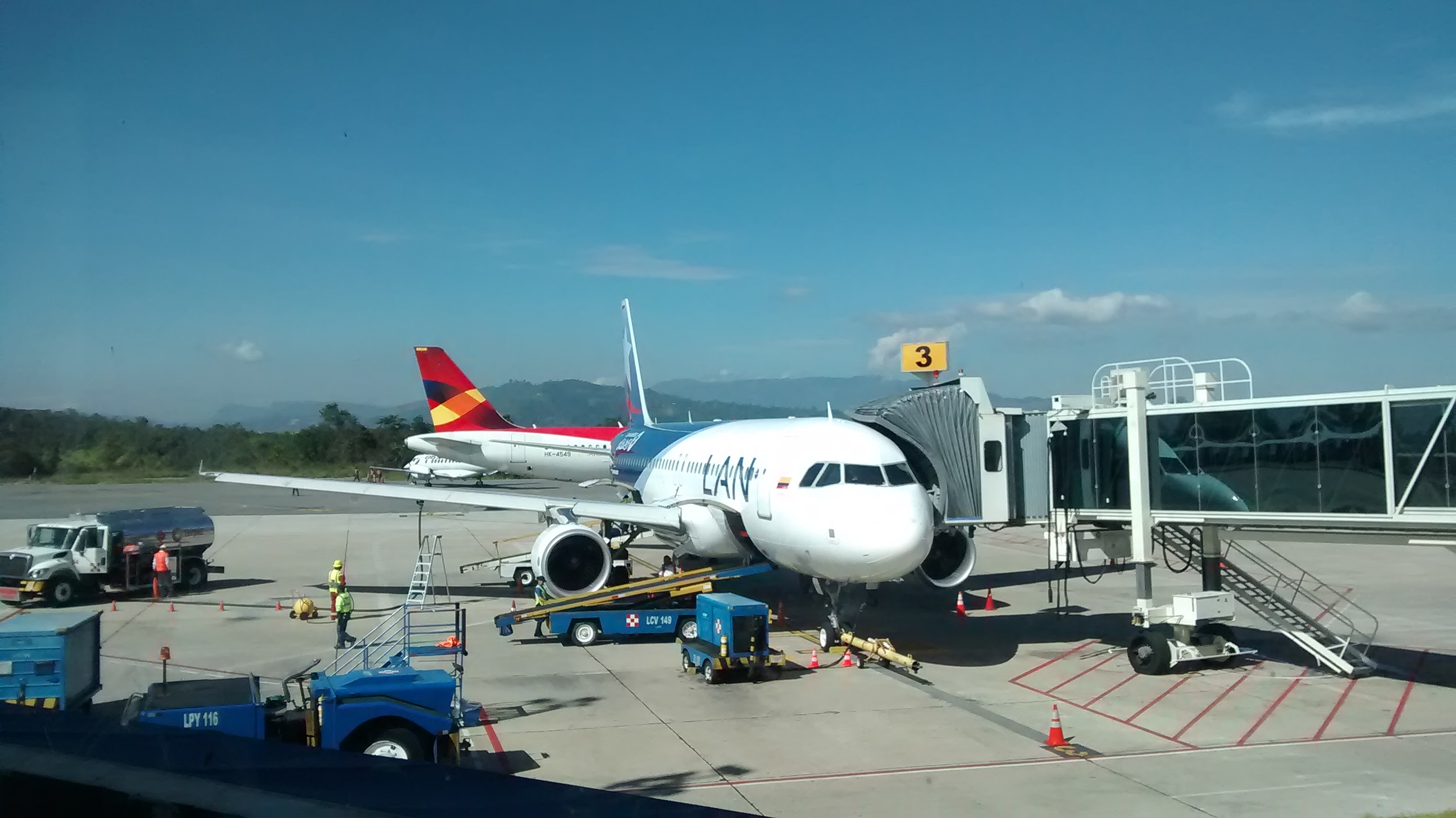 Airbus A320 de LATAM Airlines con uno de Avianca en el fondo